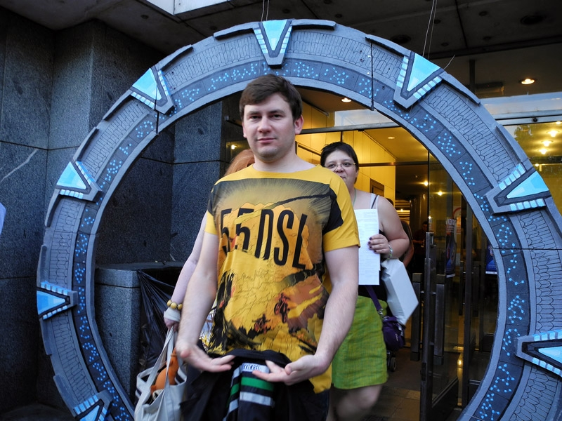 Konvencija Kontakt, koja je spojila 34. SFeraKon i 34. Eurocon u Zagrebu